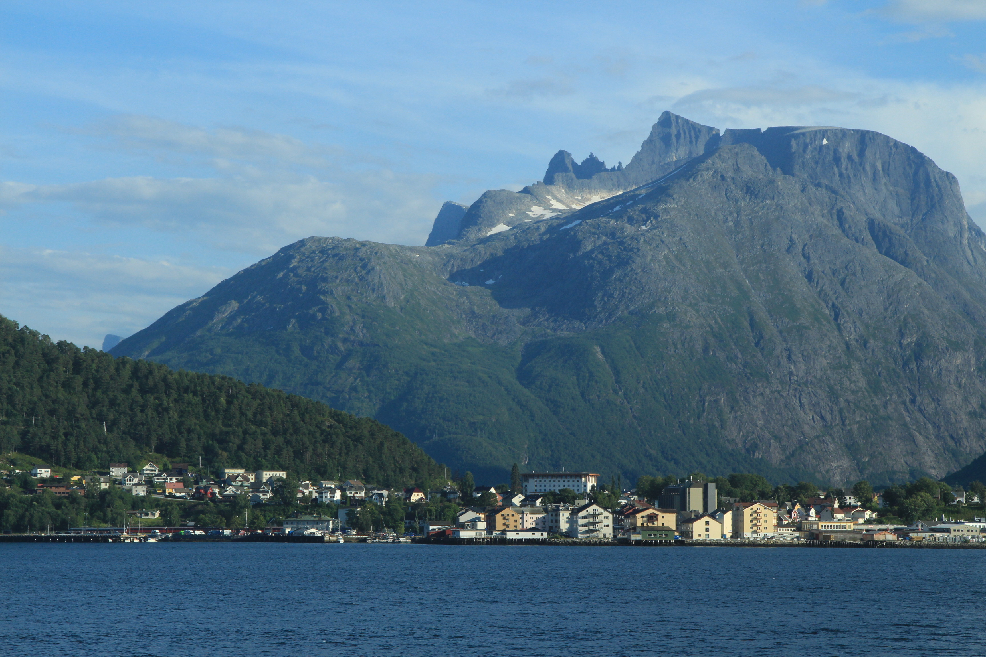 Åndalsnes